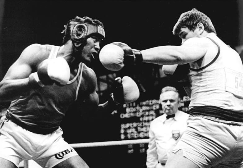 Teofilo Stevenson, Olaf Walther ADN-ZB Lehmann 31.3.84 Halle: XIII. chemie-Pokalturnier im Boxen - Halbinale - Im Superschwergewichtsduell mit dem 32jährien dreifachen Olympiasieger und zweifachen Weltmeister Teofilo Stevenson (Kuba-l.)hatte der 23jährige Schweriner Olaf Walther (r.) keine Chance und unterlag in der zweiten Runde durch ko.